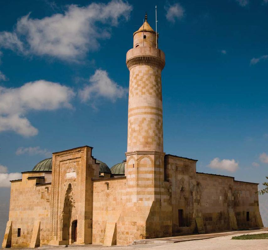 Nigde alaaddincami taci